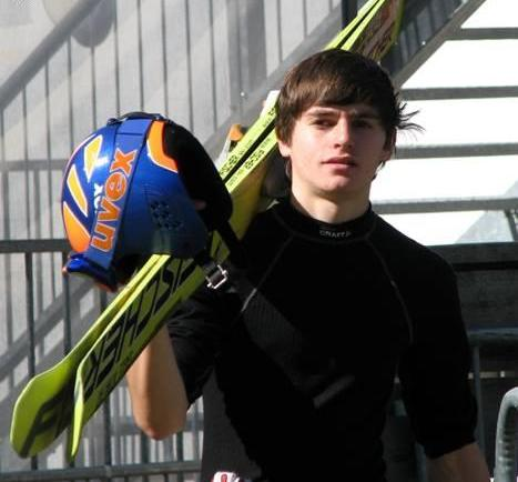 Richard Freitag (Deutschland)